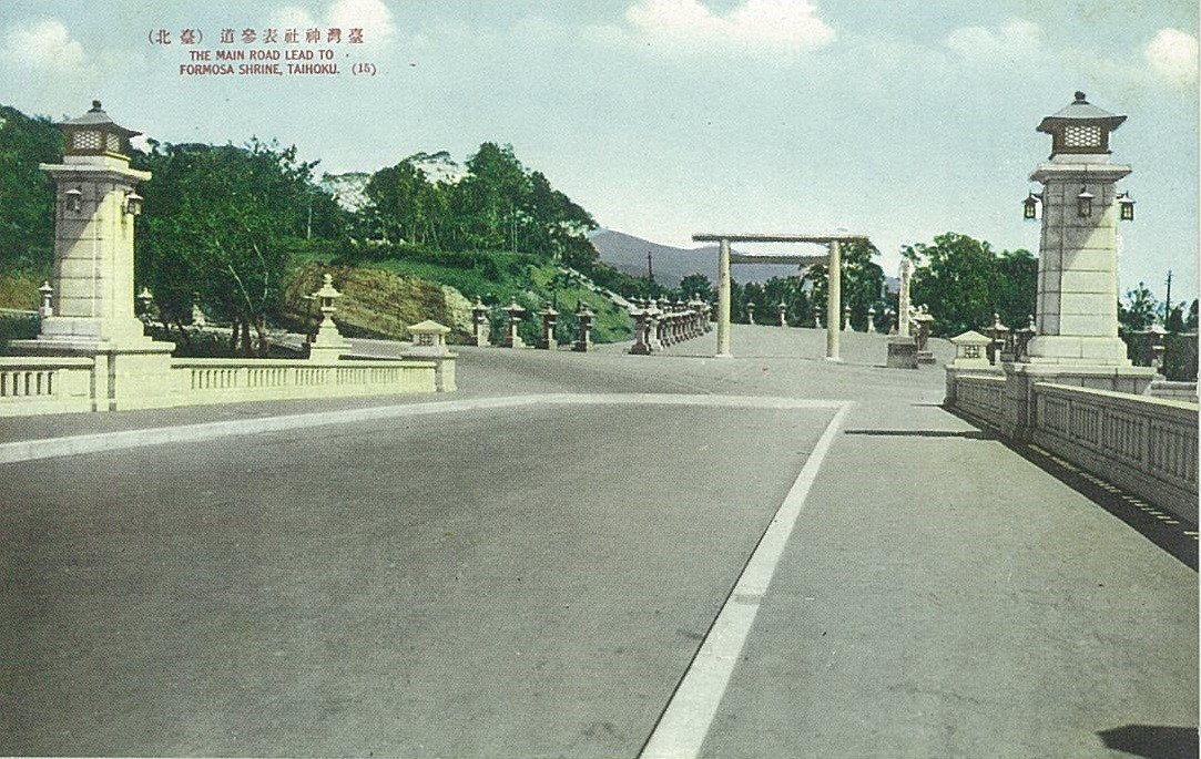 臺灣神社表參道。